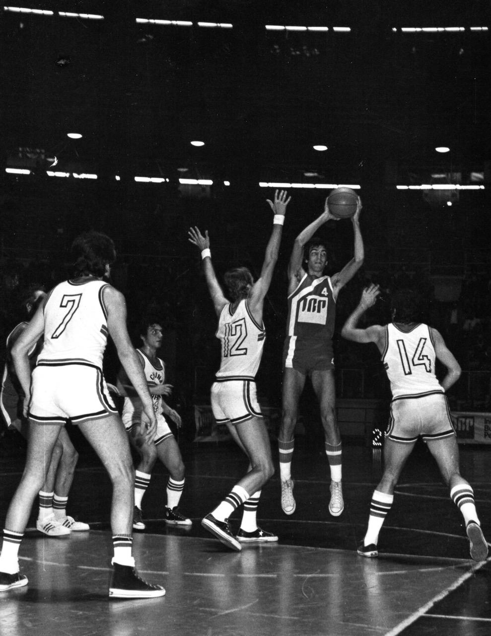 Roberto Quercia nella partita giocata in casa della IBP Stella Azzura al Palaeur di Roma contro Auxilium Chinamartini Torino del campionato italiano di basket seria A 1975/76. Sono visibili oltre a Quercia con la palla in mano, Merlati (7), John Lang (12), Riva (14) e Delli Carri (4)